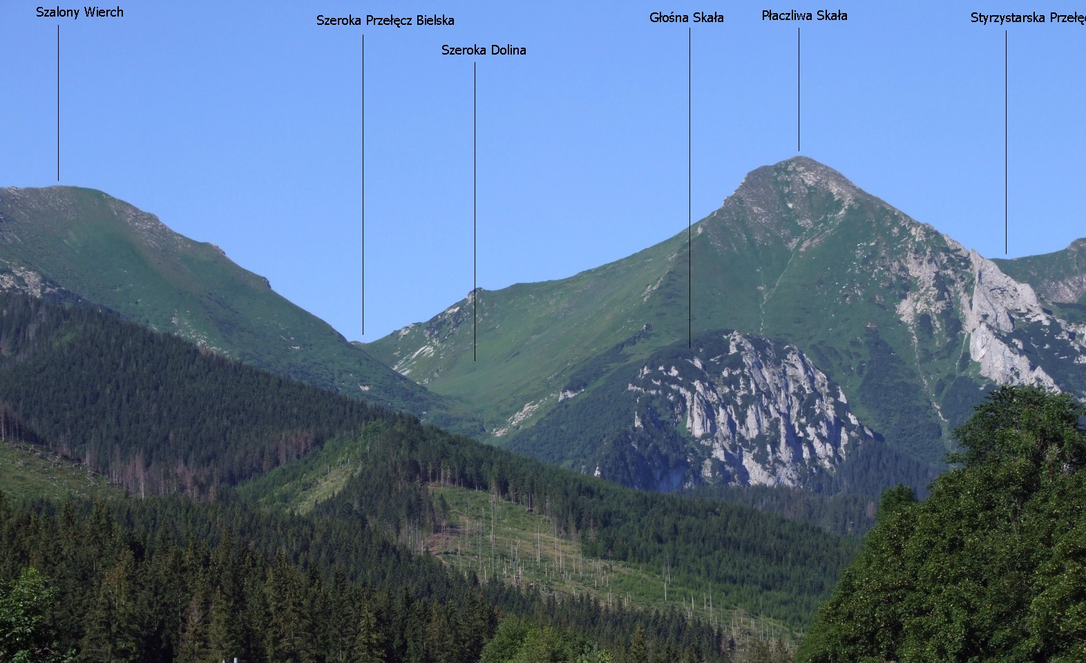 Tatry Bielskie (fragment). Widok ze Zdziaru